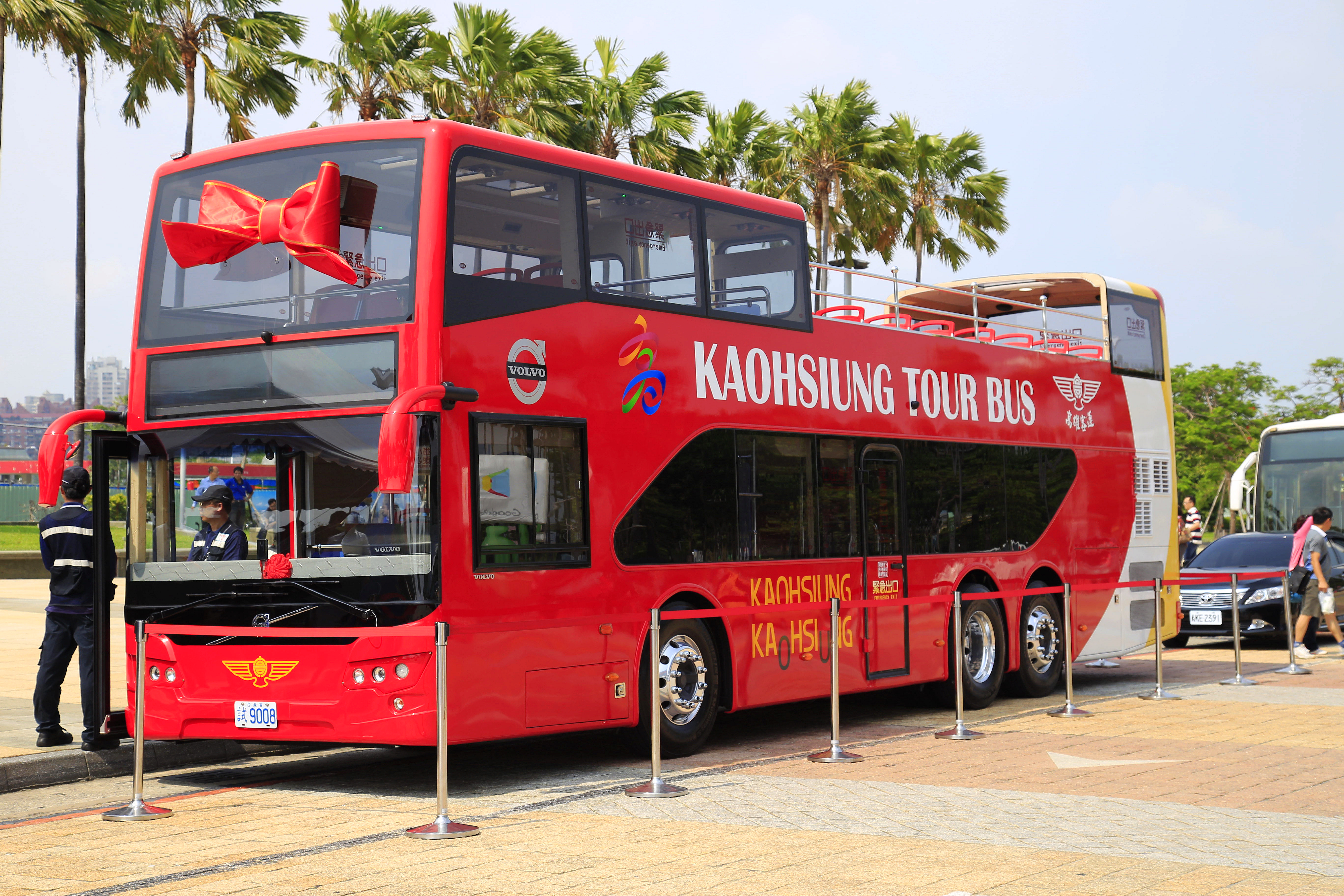 高雄客運 2016 VOLVO B8RLE雙層觀光巴士